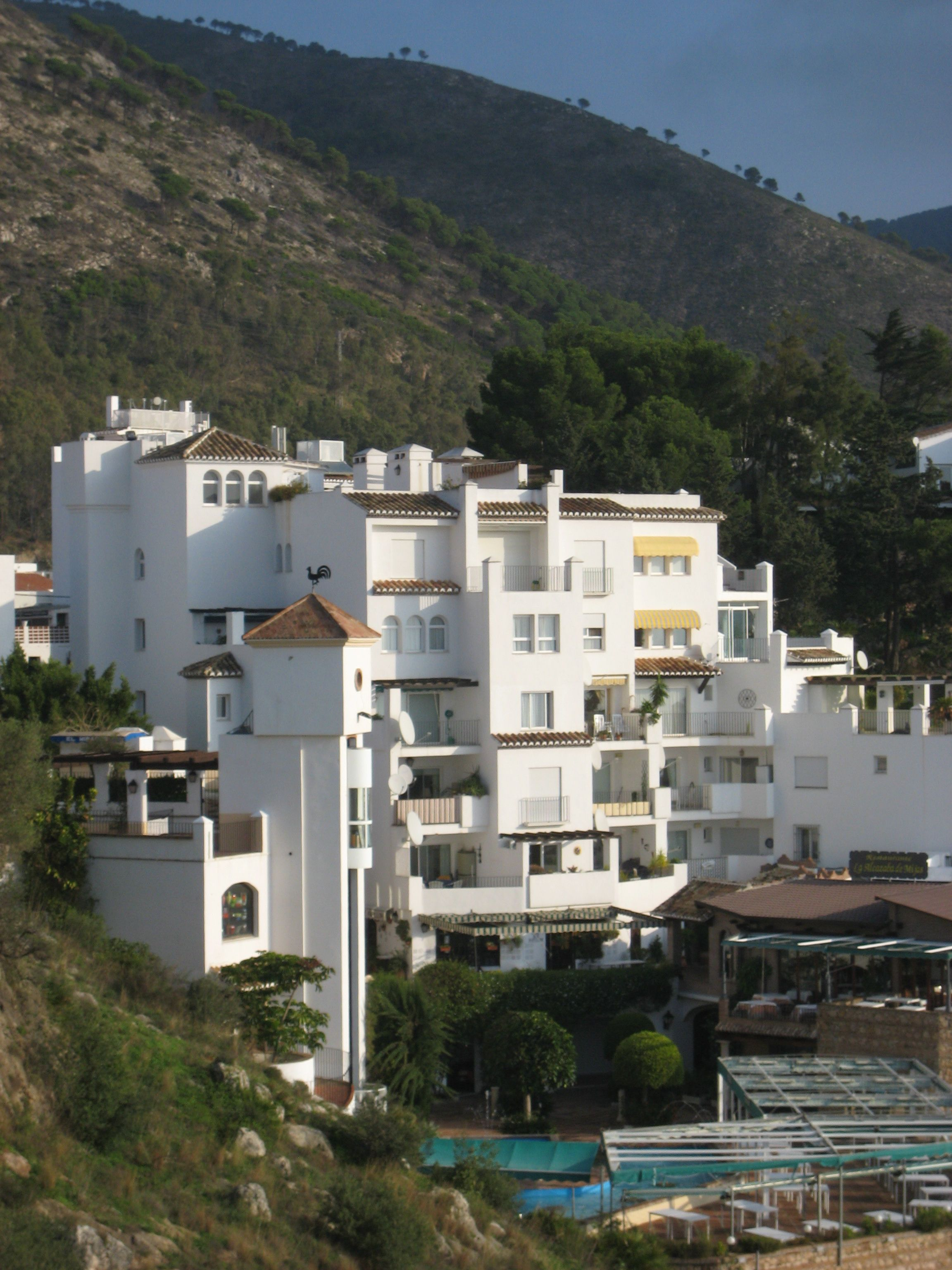 Mijas, d'Stad am Hank